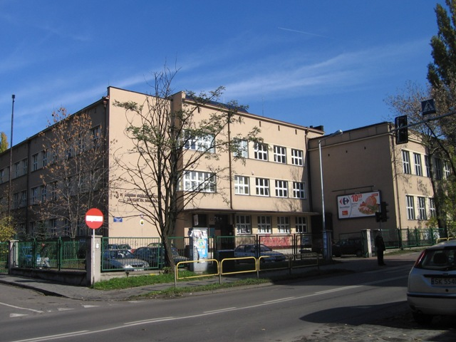 Budynek w którym mieści się czwarte liceum ogólnokształcące.